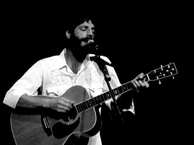 Ray LaMontage en vivo